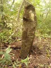 Nubar adalah batu penyembahan regligiositas rakyat Orang Ataili